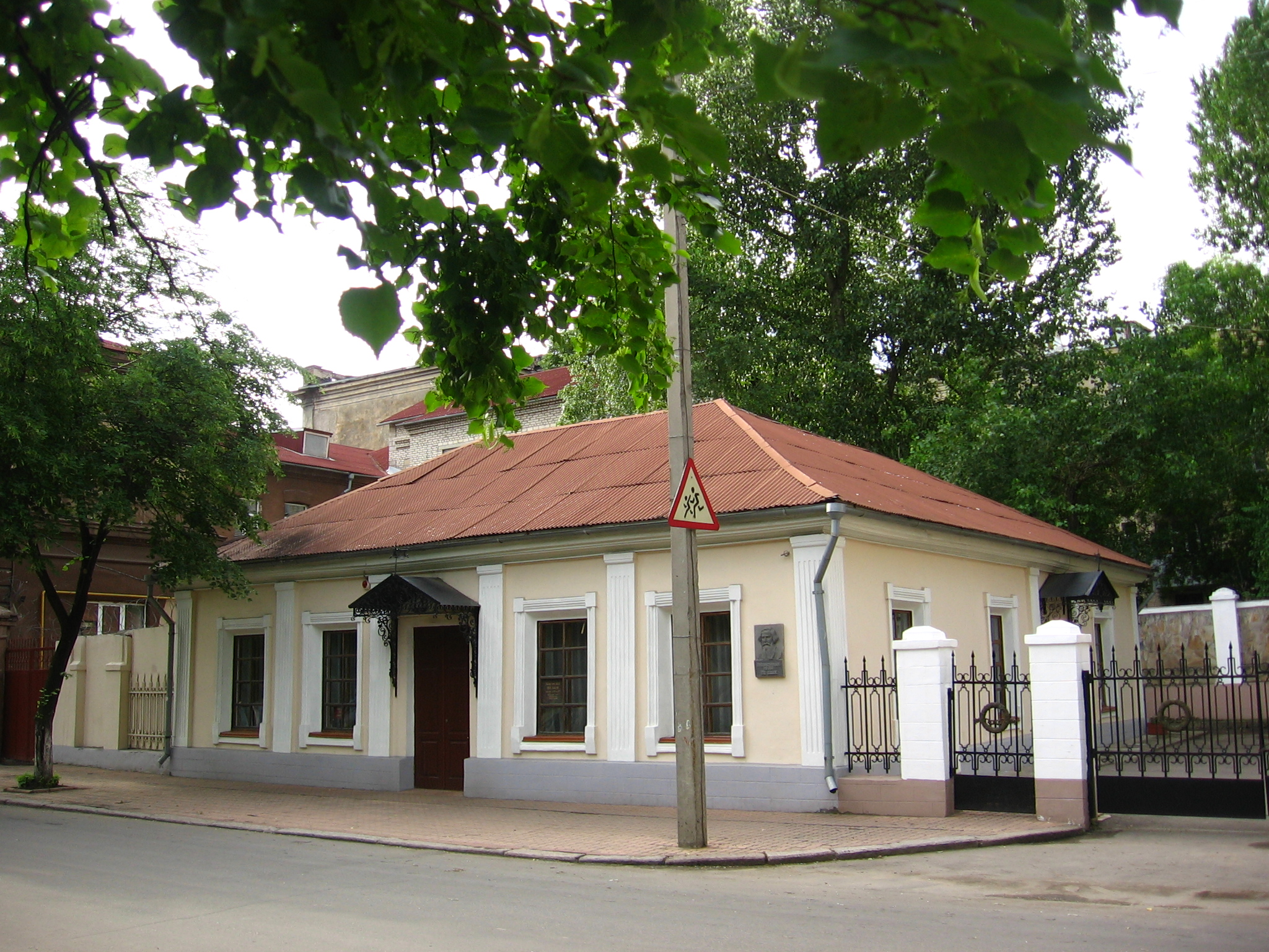 Vladimir Dal's house in Luhansk